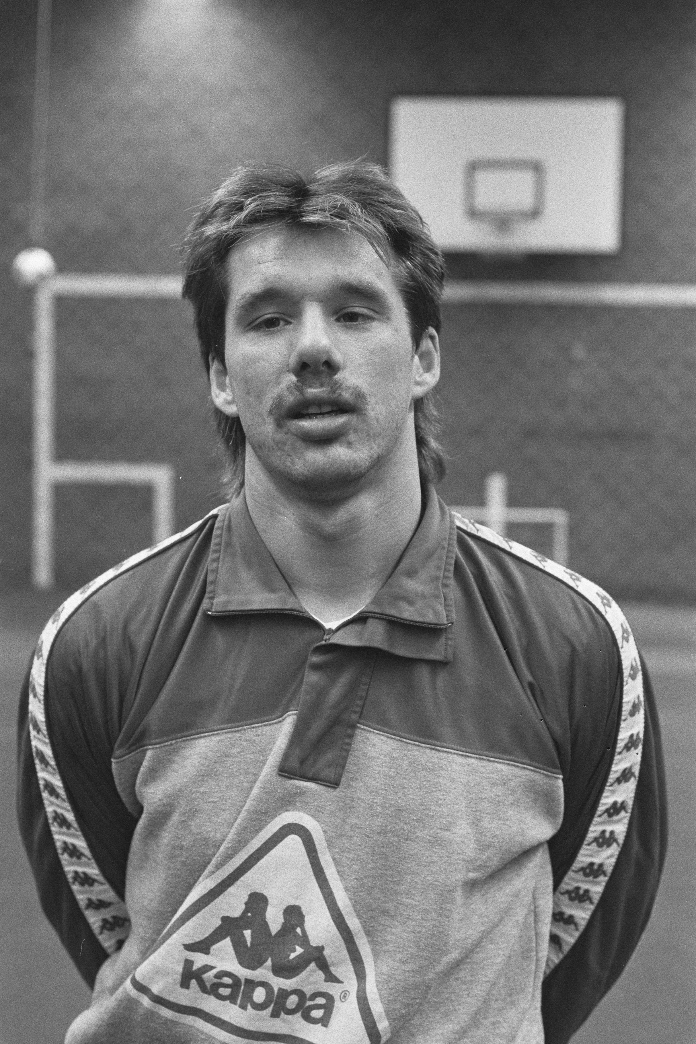 Collectie / Archief : Fotocollectie Anefo Reportage / Serie : [ onbekend ] Beschrijving : Ajaxied Rob de Wit , kop, i.v.m. hervatting training na hersenbloeding Datum : 2 februari 1987 Trefwoorden : sport, voetballers Persoonsnaam : Wit, Rob de Fotograaf : Molendijk, Bart / Anefo Auteursrechthebbende : Nationaal Archief Materiaalsoort : Negatief (zwart/wit) Nummer archiefinventaris : bekijk toegang 2.24.01.05 Bestanddeelnummer : 933-8784